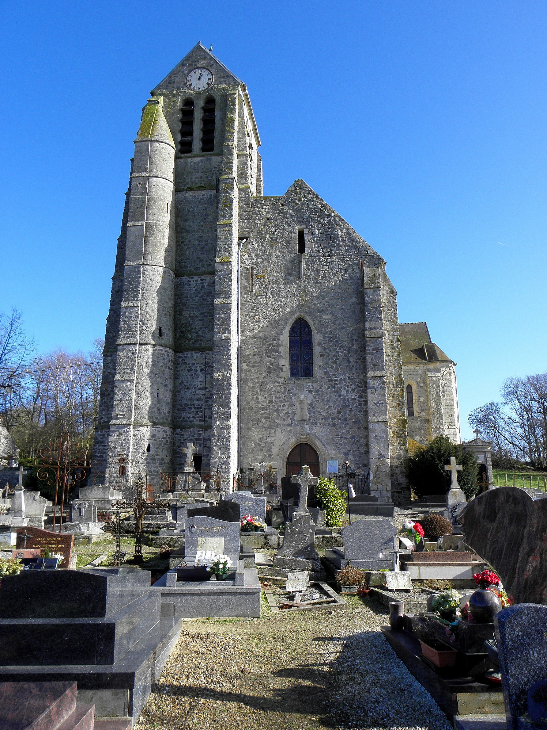 Église Saint-Pierre et Saint-Paul de Bouillancy (60). Façade occidentale.